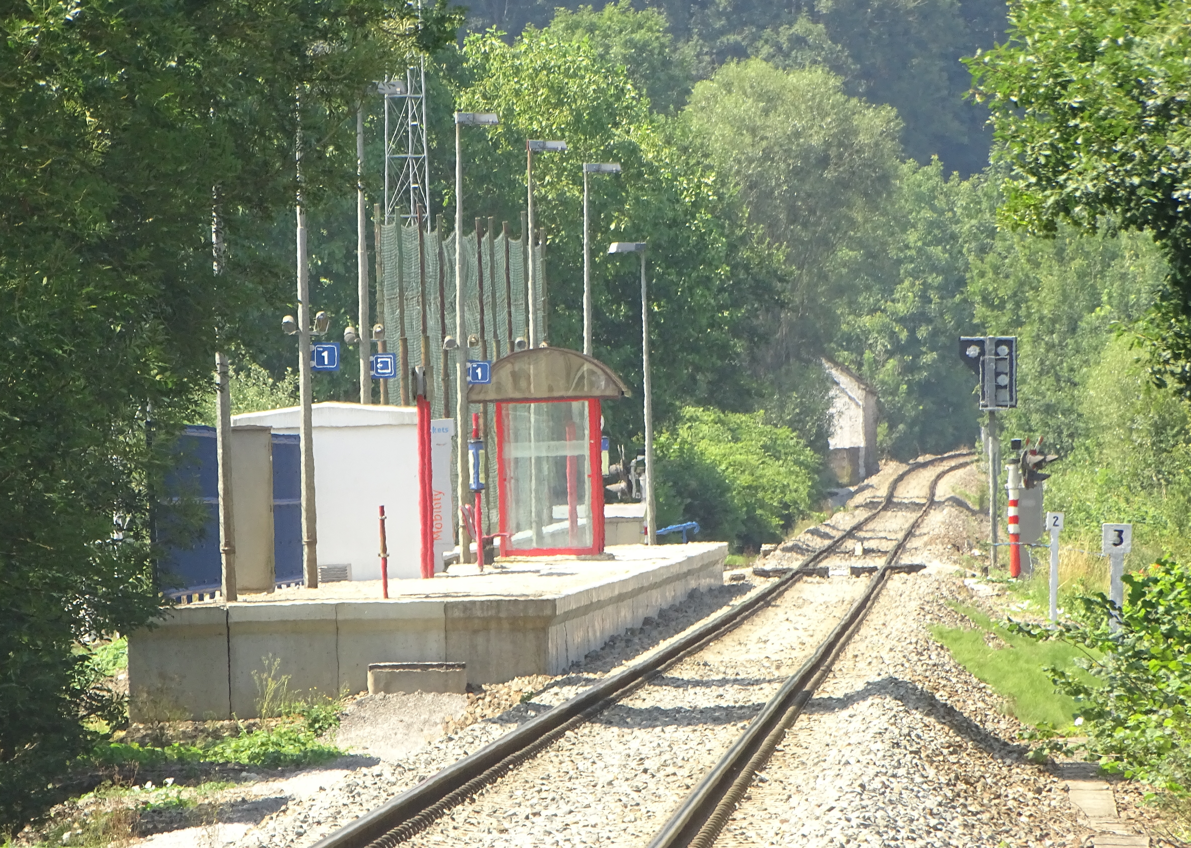 Reportage réalisé le vendredi 7 août à l'occasion de la troisième étape du Tour de la province de Namur 2015 à Yves-Gomezée (Walcourt), Belgique.